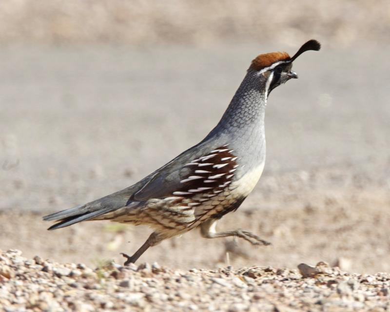 Gambel's quail - male Callipepla gambelii Las Vegas suburbs, Nevada, USA November 9 2010 Distribution: 690V4462